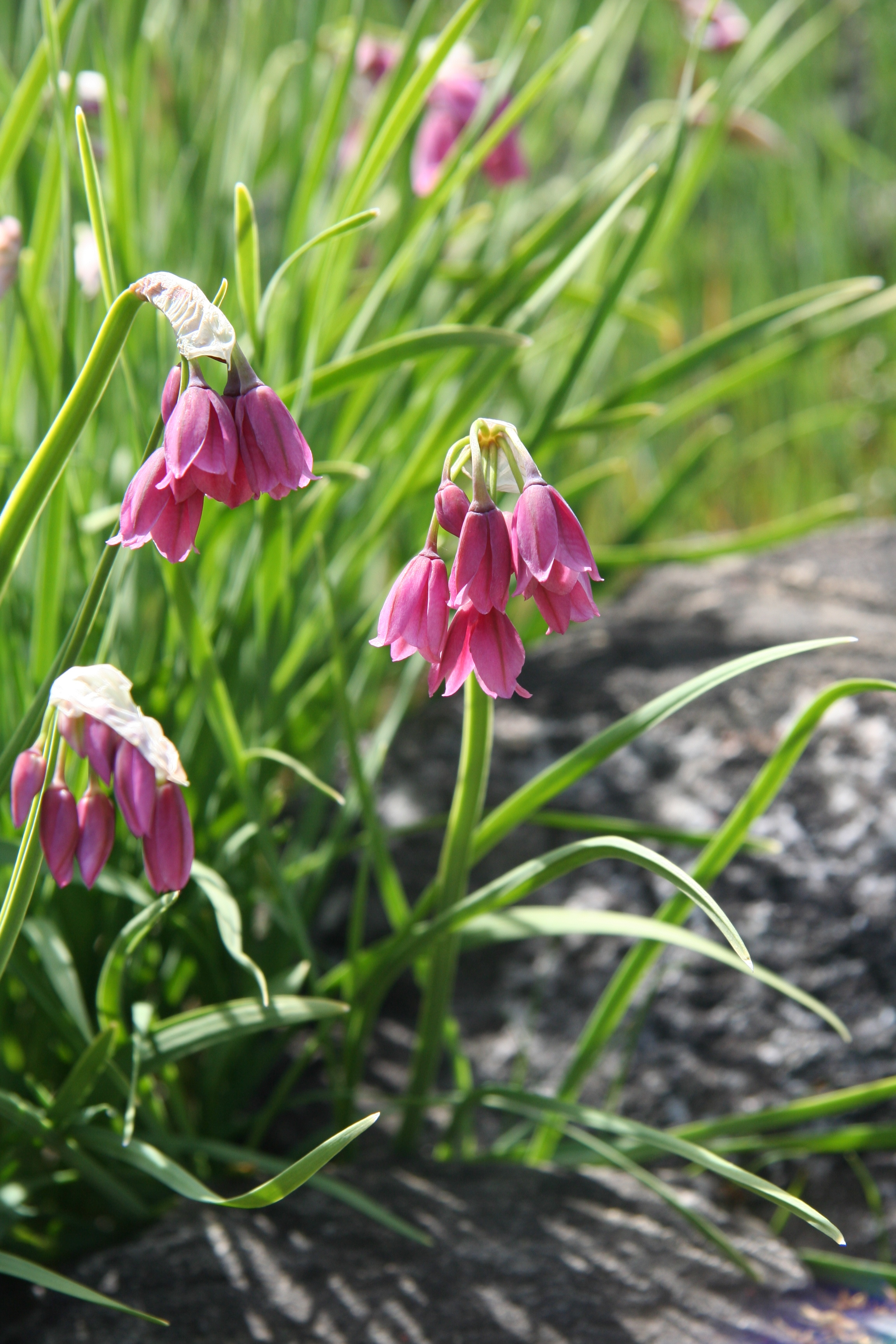 Allium insubricum im Botanischen Garten Dresden